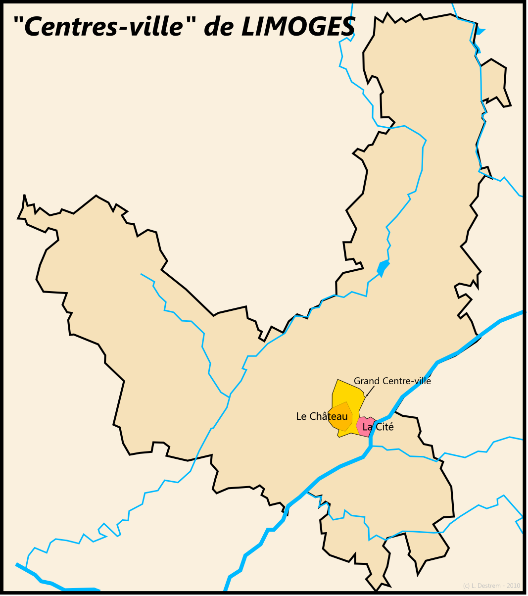 Différenciation des "centres-ville" de Limoges